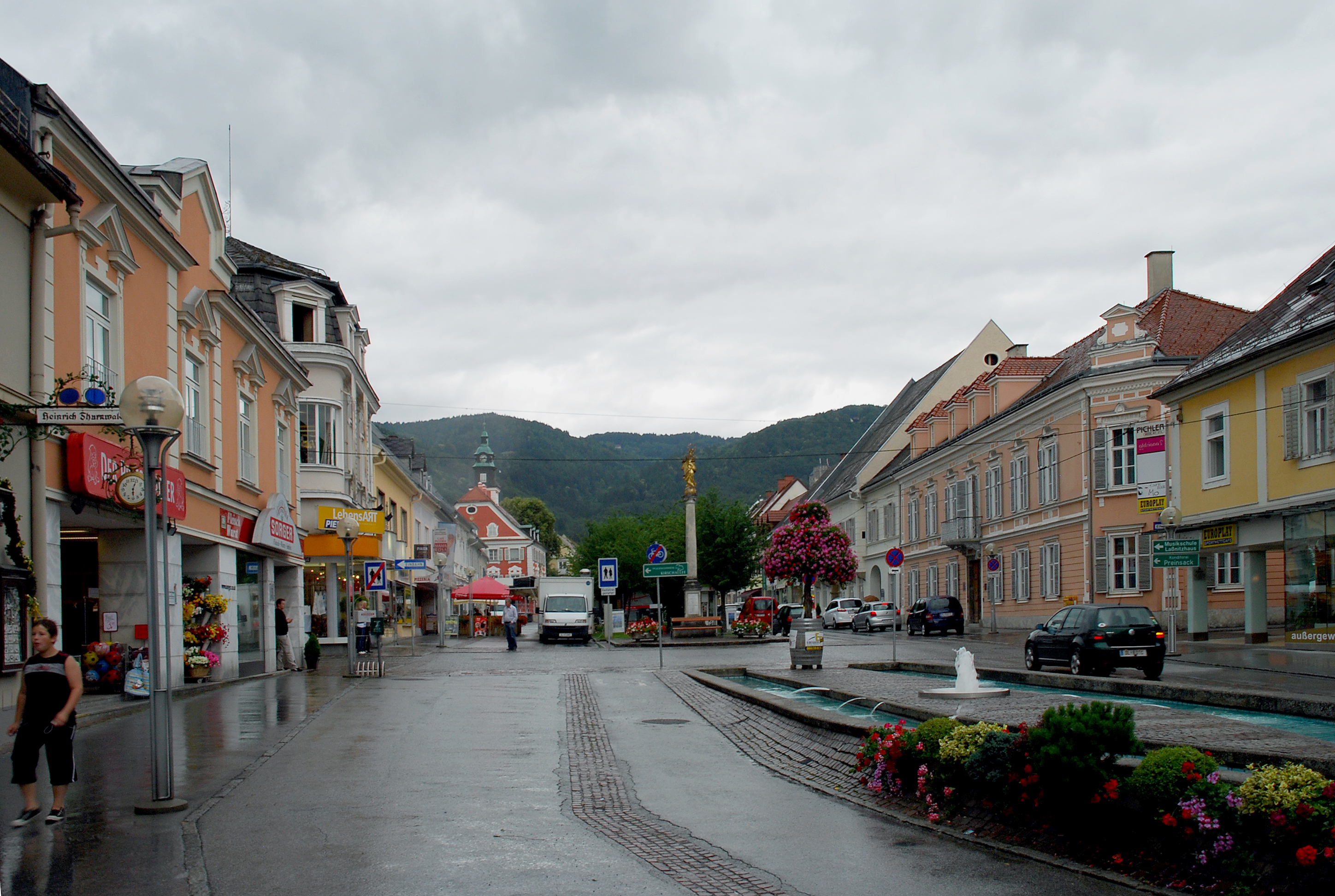 Deutschlandsberg, Steiermark, Österreich: Hauptplatz westlicher Teil